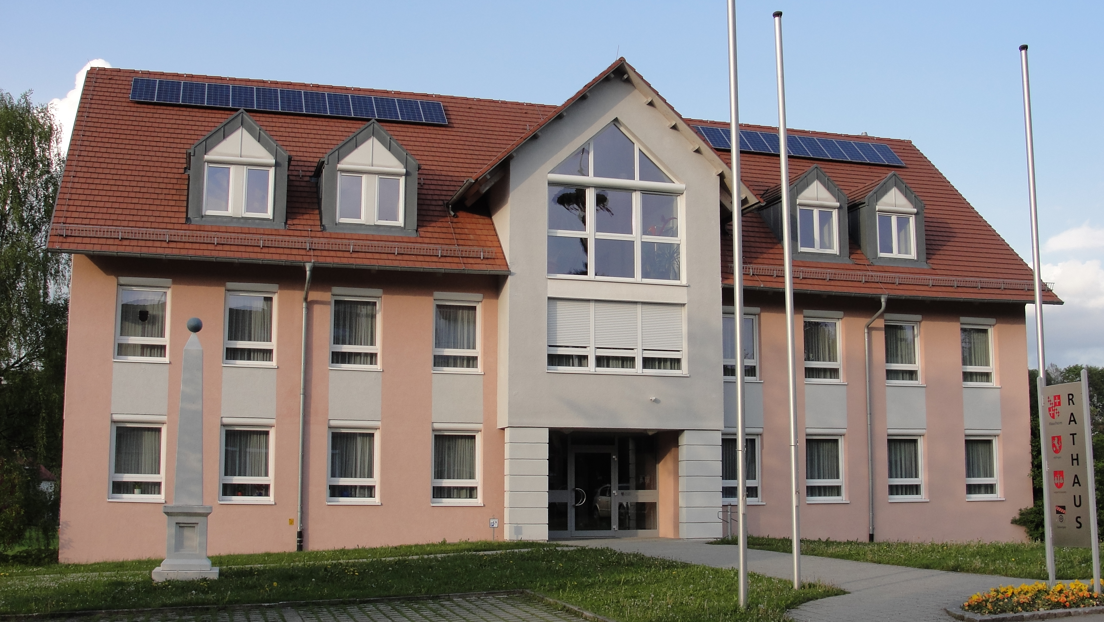 Rathaus der Gemeinde Maselheim in der Ortschaft Maselheim.